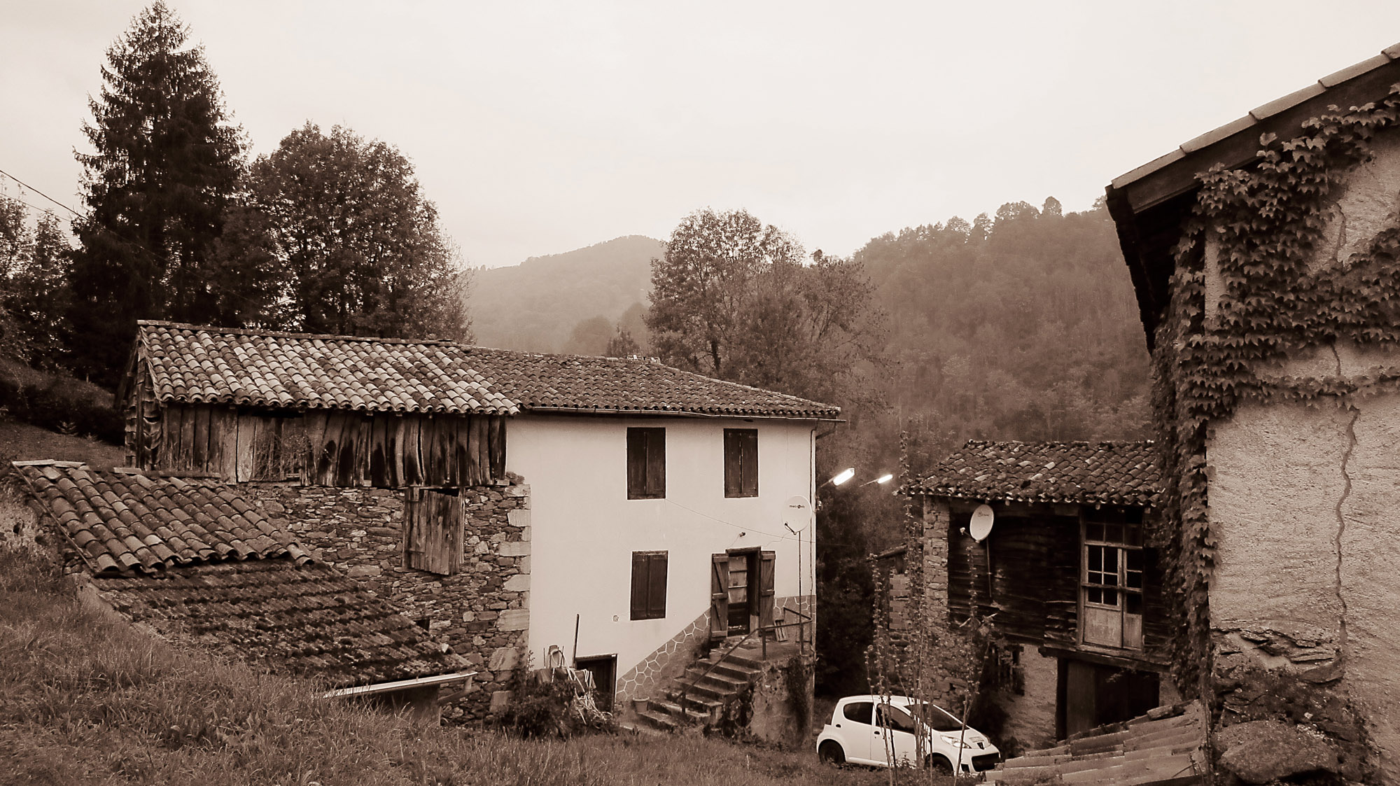 Rivèrenert (Ariège, Midi-Pyrénées, France) : Centre du village.